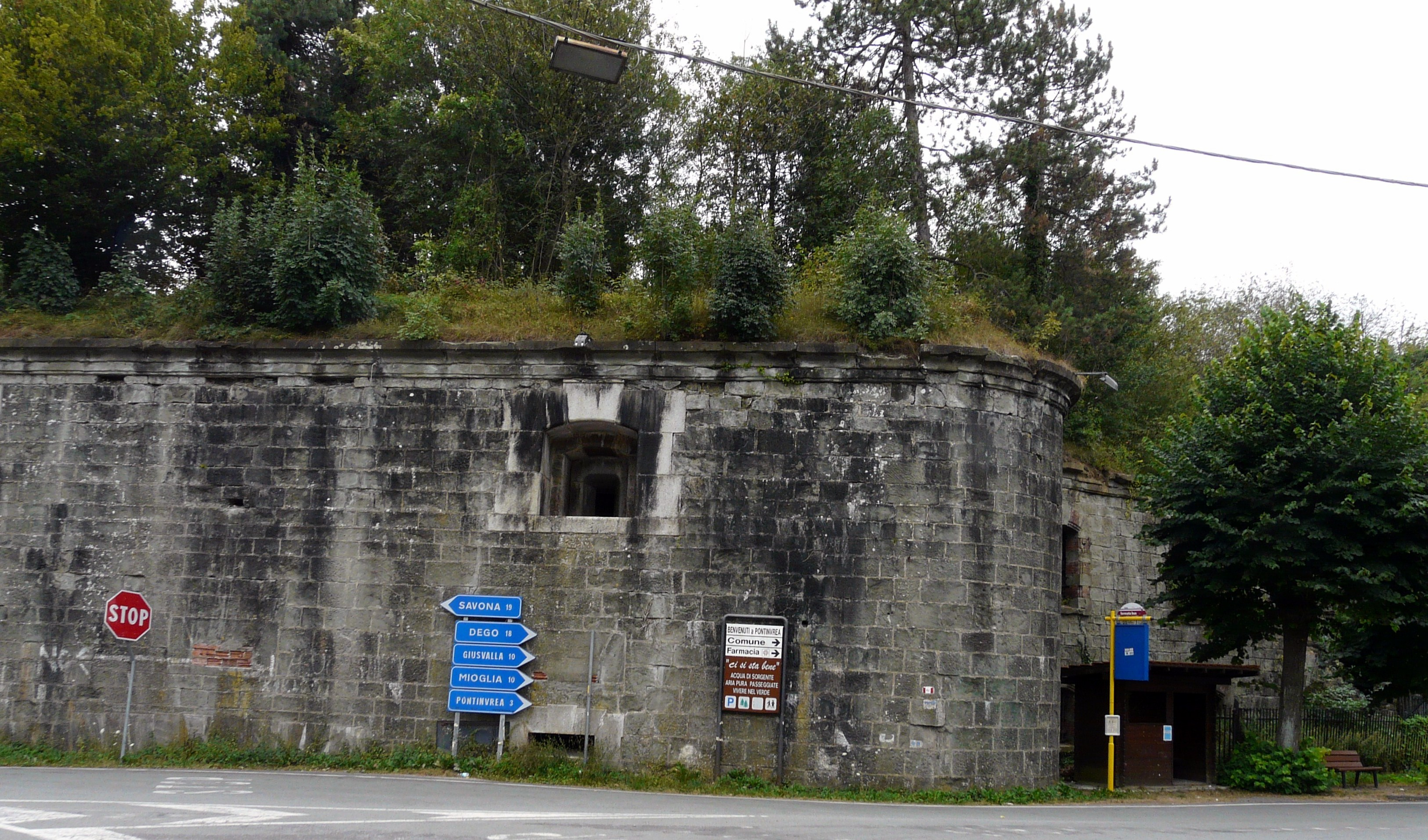 Il forte Tagliata del Giovo, Giovo Ligure, Pontinvrea, Liguria, Italia